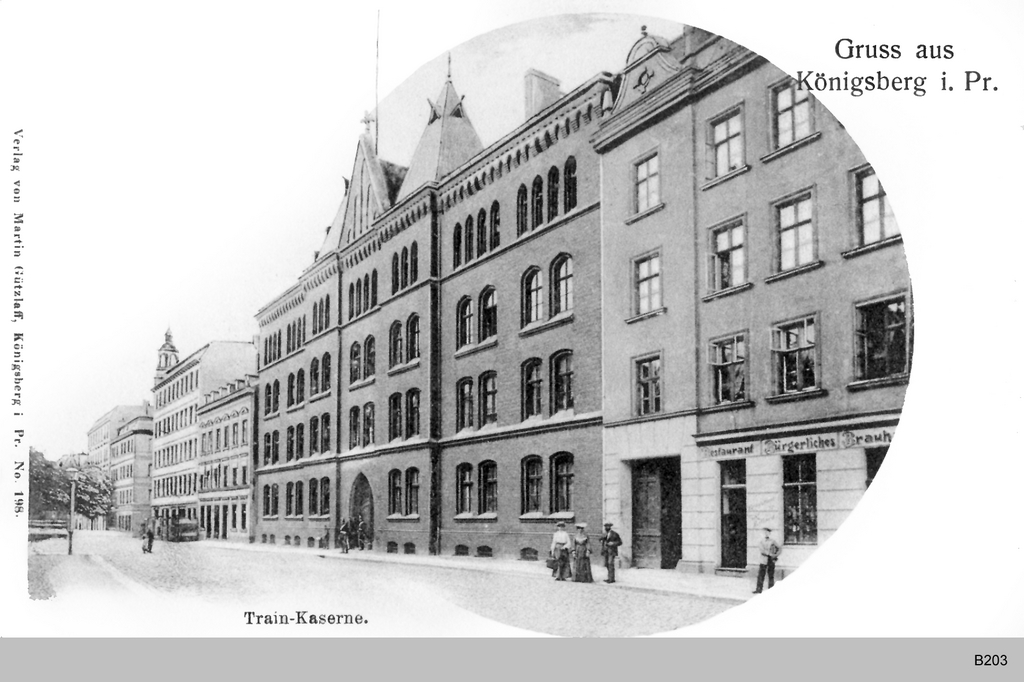 Königsberg